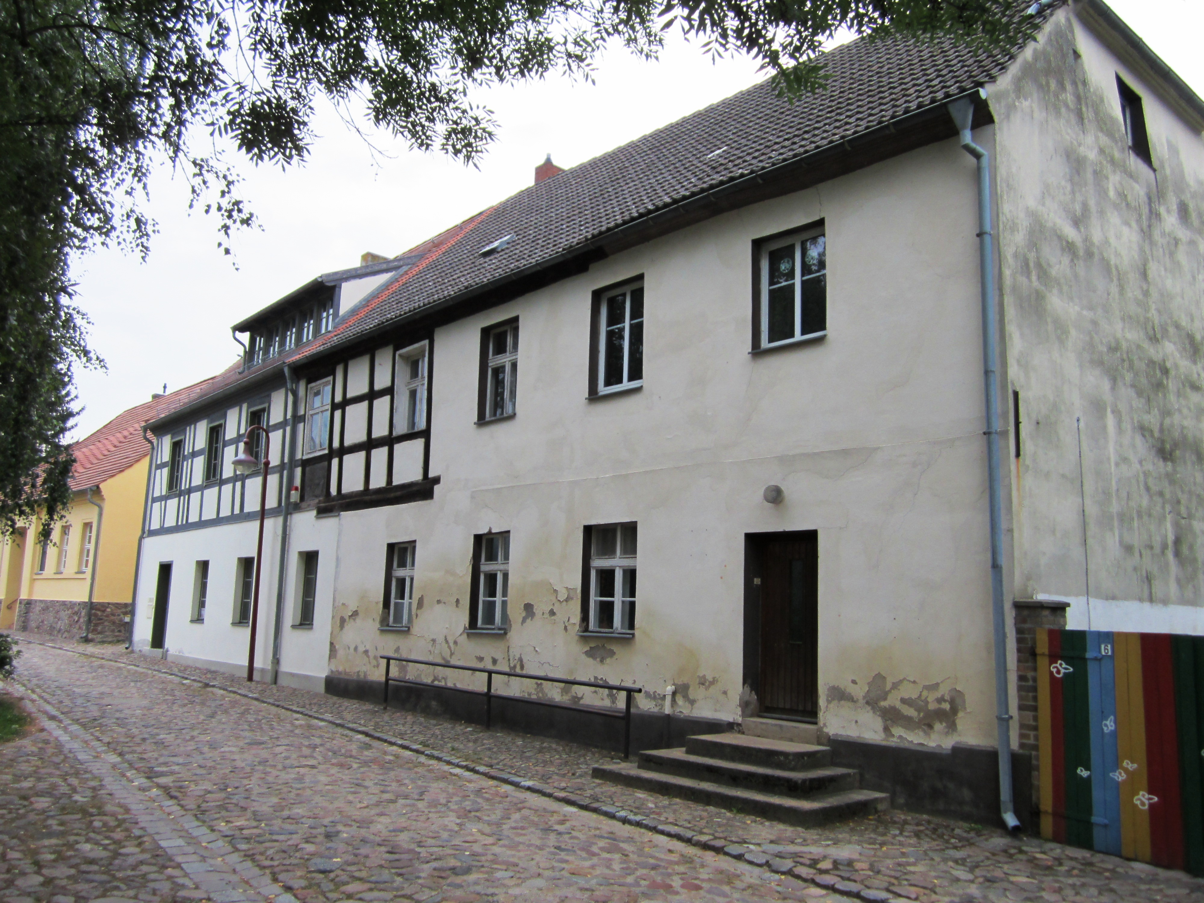 denkmalgeschützte Gebäude in Lebus, Schulstraße 6 und 7